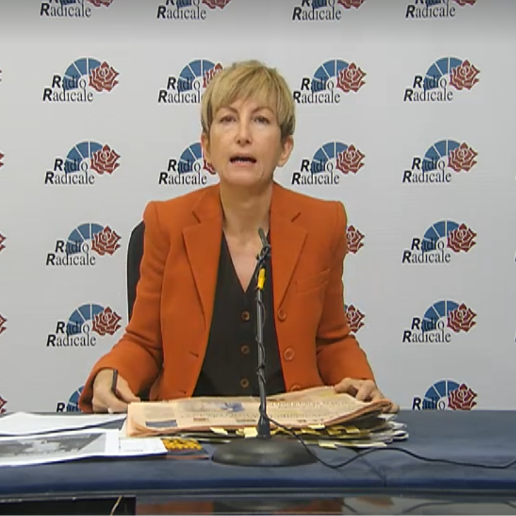 Flavia Fratello durante la puntata del 13/03/2020 della trasmissione di rassegna stampa di Radio Radicale "Stampa e regime"